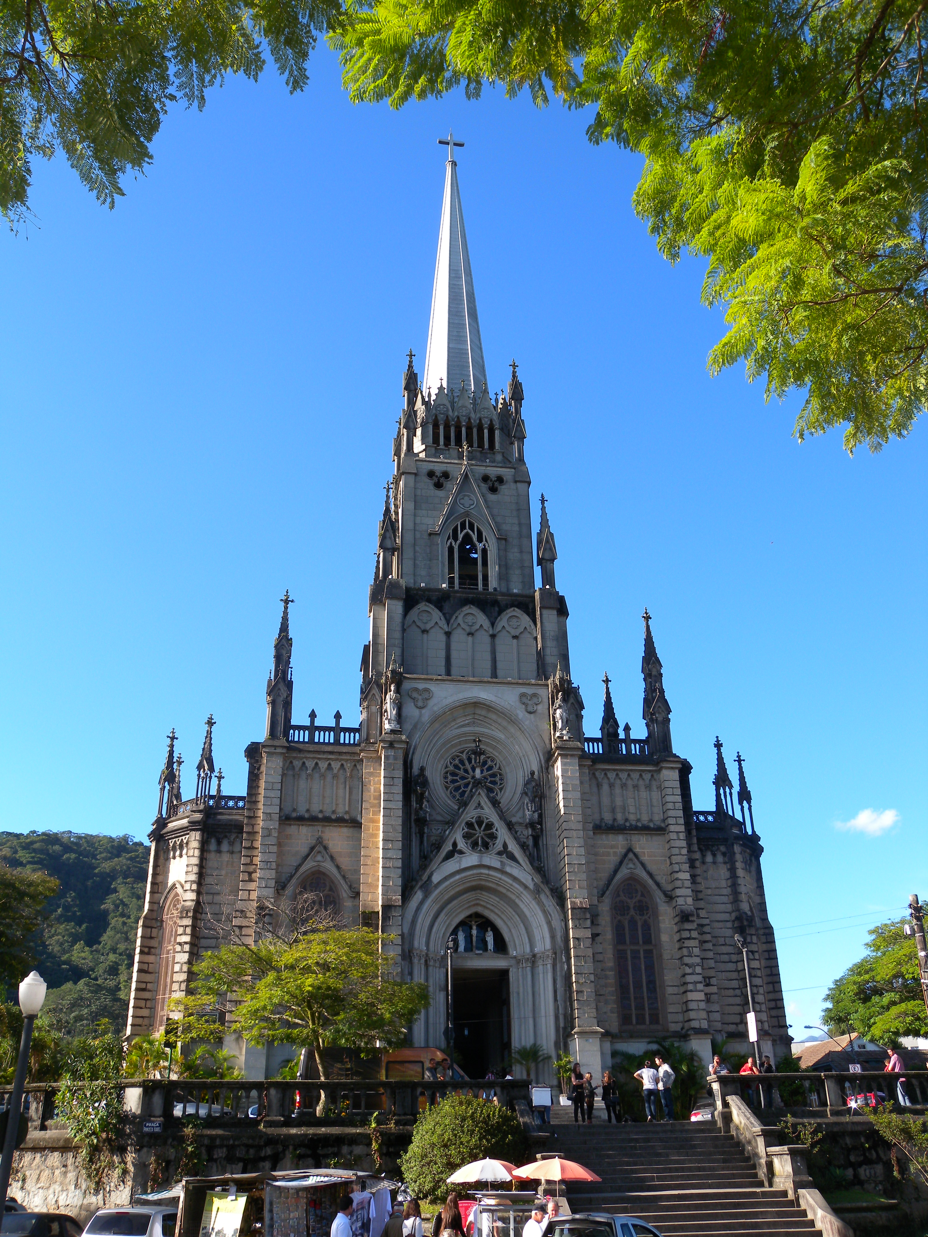 Catedral de São Pedro de Alcântara Petrópolis